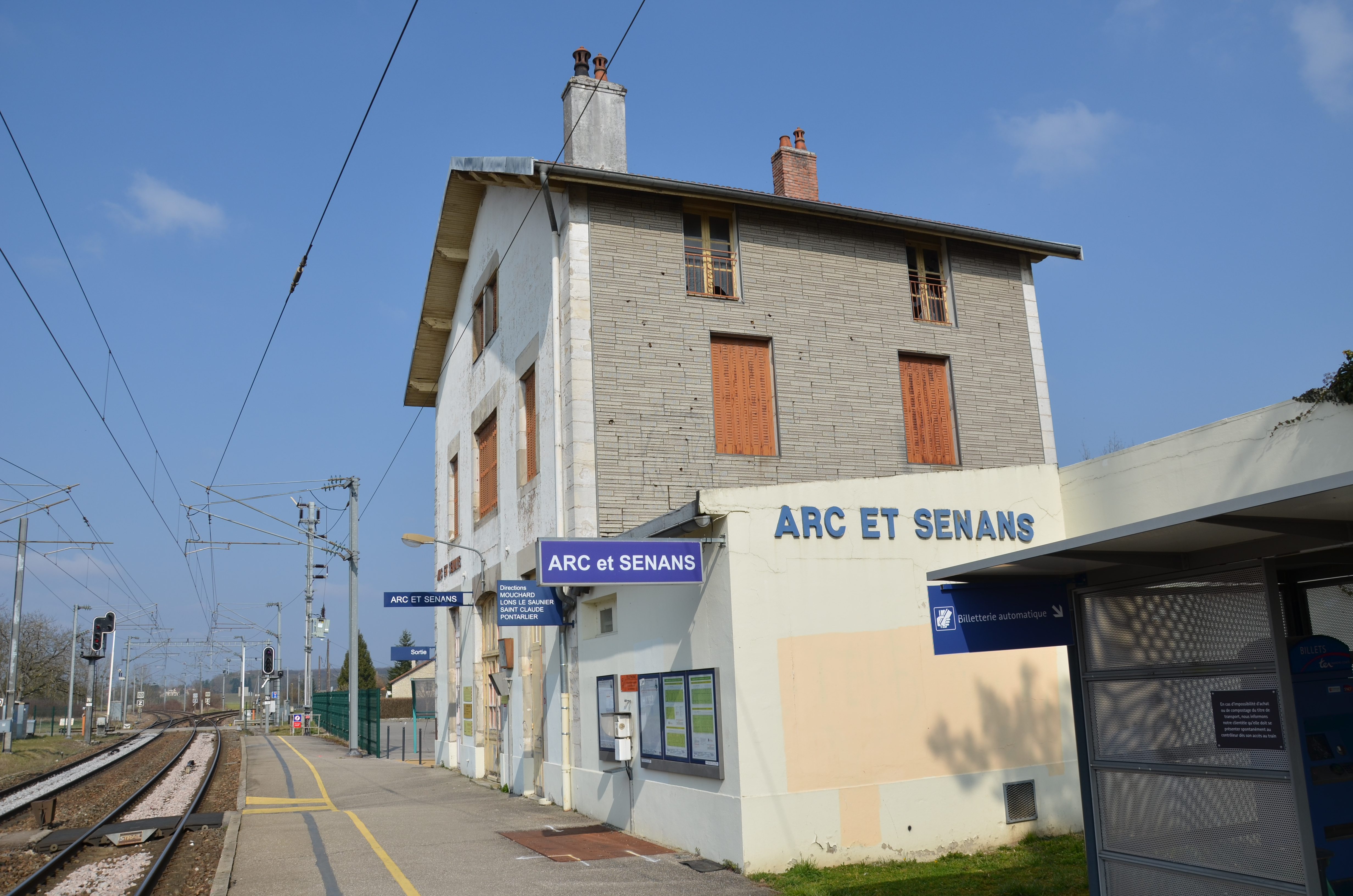 Gare d'Arc et Senans coté voie (direction Pontarlier)